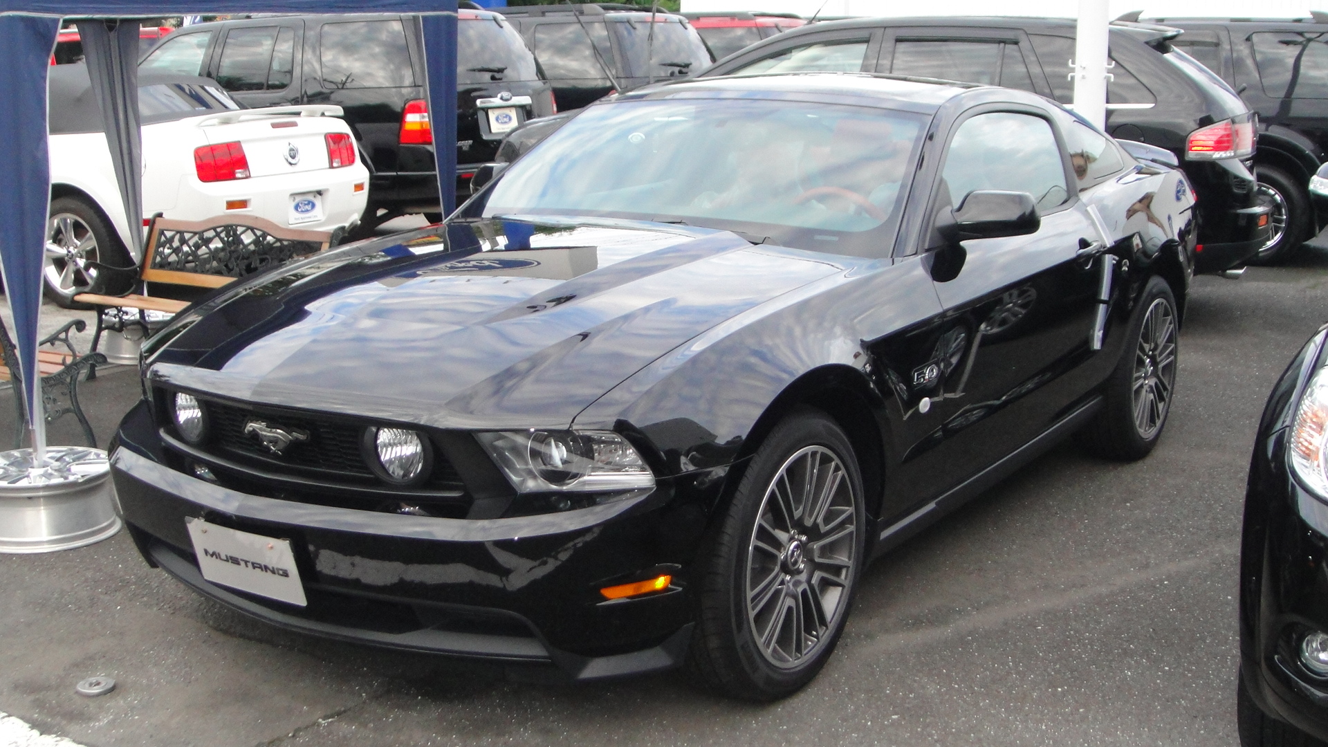 フォードマスタングGT 5.0L V8